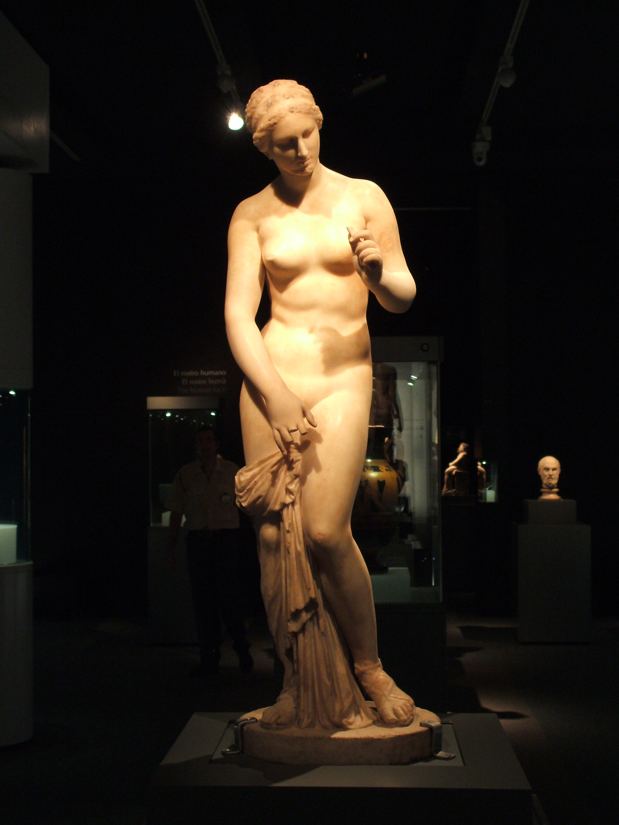 Estatua de Afrodita sorprendida desnuda y dispuesta para el baño